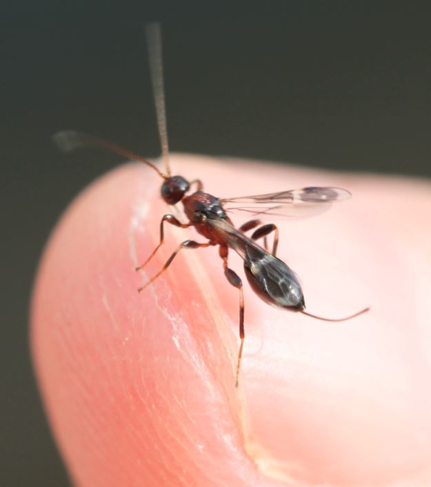 Spathius erythrocephalus am 11. Mai 2018